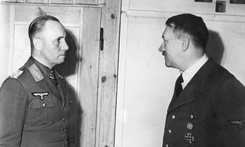 Hitler mit Gen.Feld.Marsch. Rommel